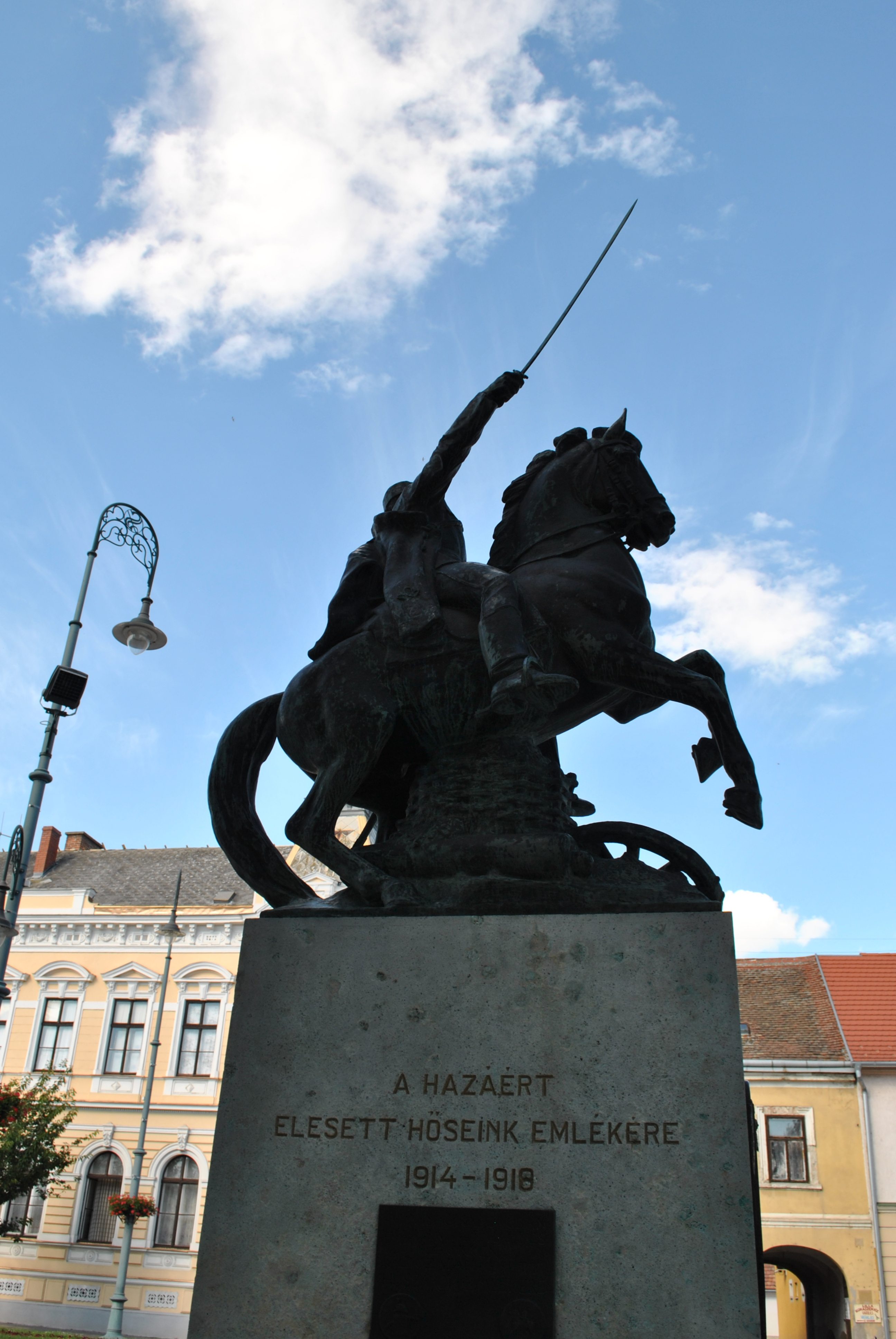 Sárvár, Kossuth tér, a katolikus templom főbejárata előtt. - I. és II. világháborús emlékmű. Az alkotás a rohamot vezérlő Nádasdy-huszár alakját formálja meg. Tóth István, 1934.